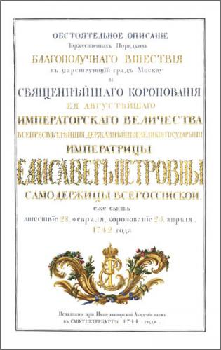 Титульная страница альбома